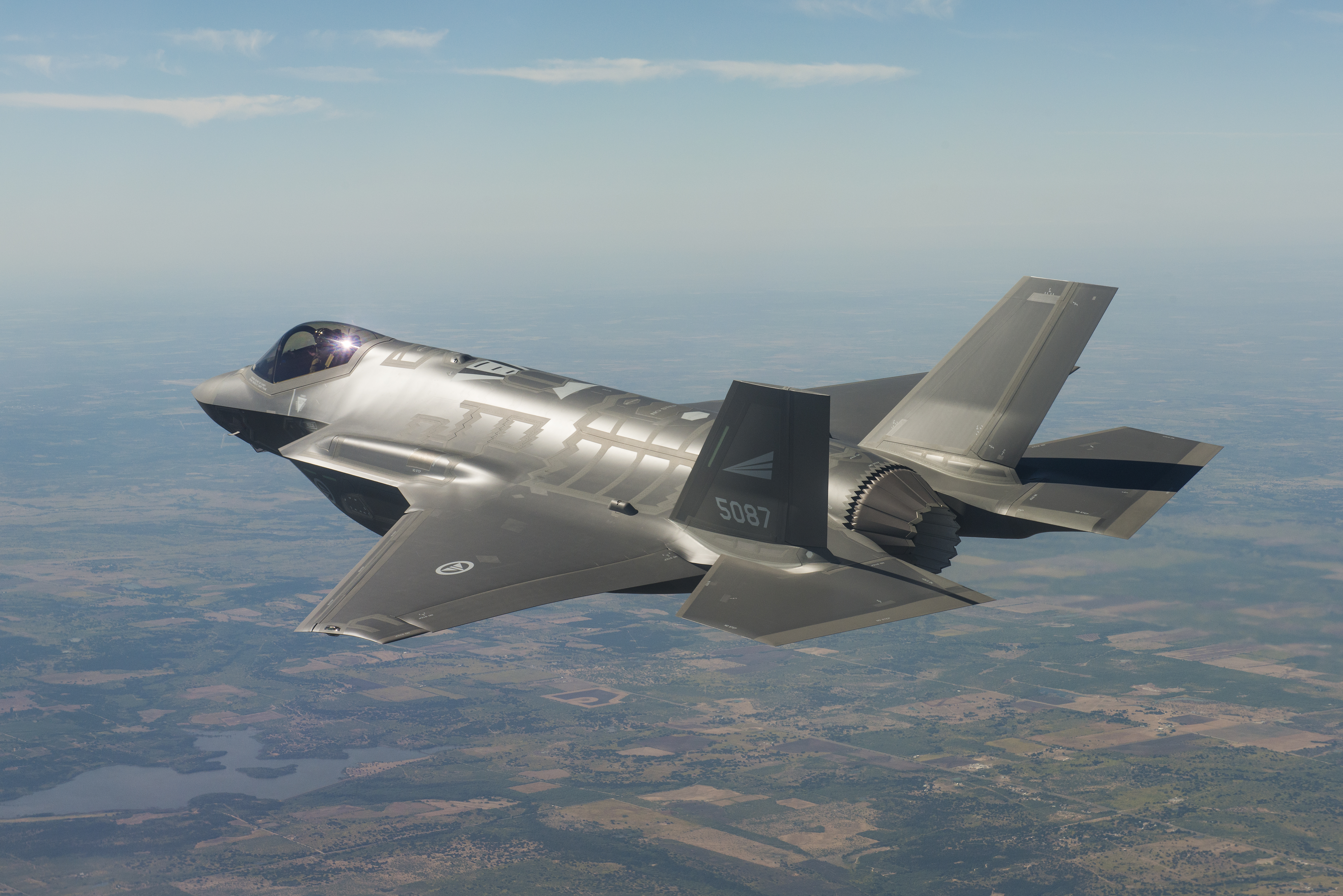 Her tester en flyger fra det amerikanske luftforsvaret Norges første F-35 (AM-1 - 5087) fra Lockheed Martins fabrikk i Fort Worth, Texas, 15. oktober. Bildene tilhører Lockheed Martin, men kan fritt brukes mot kreditering. Fotograf: Kaszynski - Images from a test flight of Norway's first F-35 taken on 15 October 2015. Photo: Kaszynzki, Lockheed Martin.